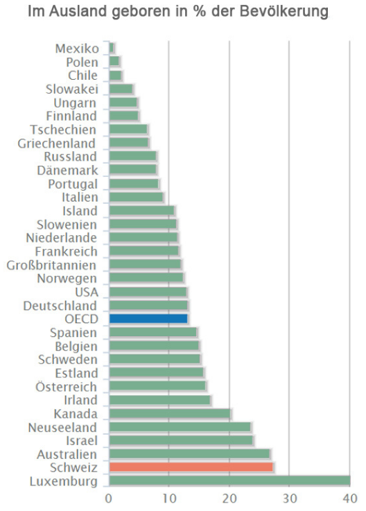 Anteil der im Ausland geborenen Personen an der Gesamtbevölkerung in OECD-Ländern. Quelle: Daten laut International Migration Outlook 2013, OECD 2013, ISBN 978-92-64-20015-9